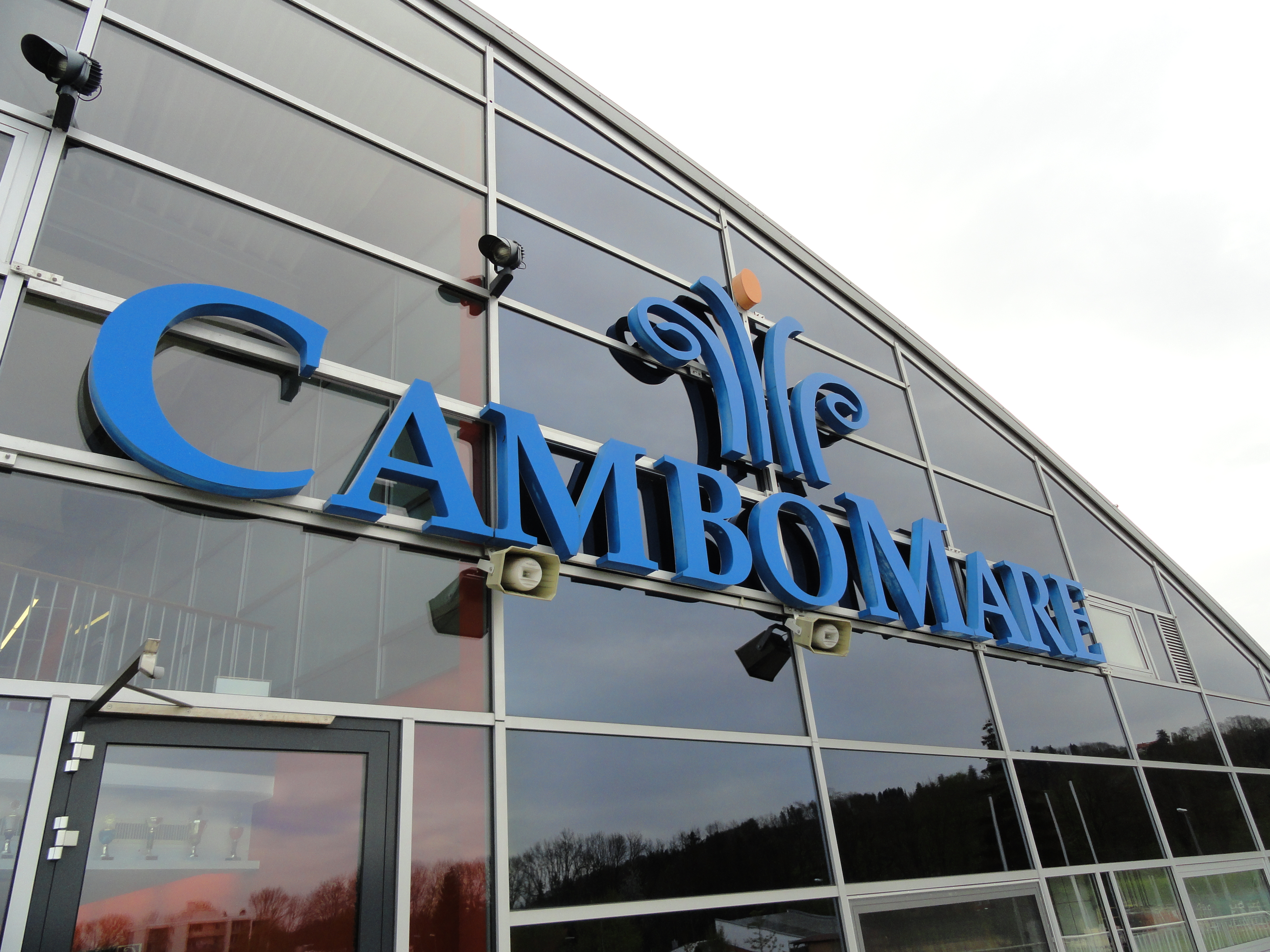 x